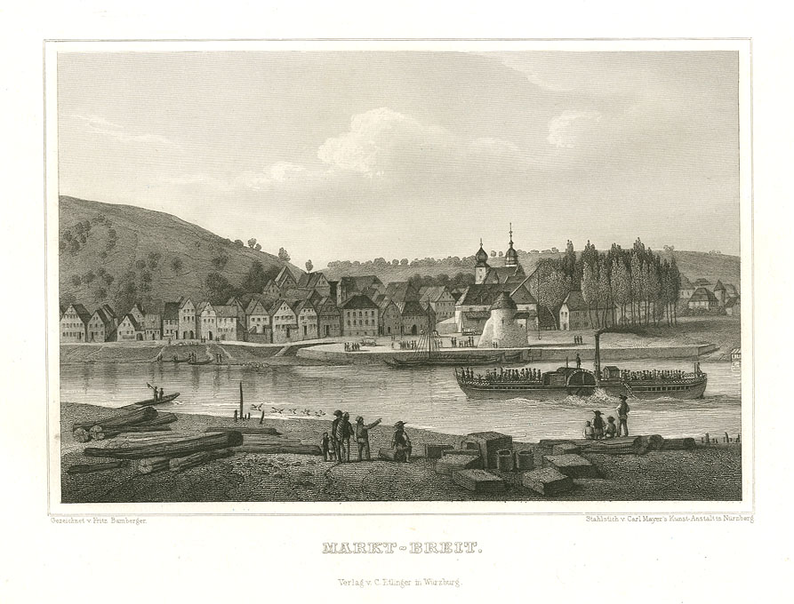 "Markt-Breit". Stahlstich nach Vorzeichnung von Fritz Bamberger, 1847, aus: Ludwig Braunfels; Die Mainufer und ihre nächsten Umgebungen. Verlag Carl Etlinger, Würzburg 1847. Gedruckt in der Kunstanstalt von Carl Mayer, Nürnberg. Darstellung : 11 × 16 cm – Blattgröße : 15 × 23 cm